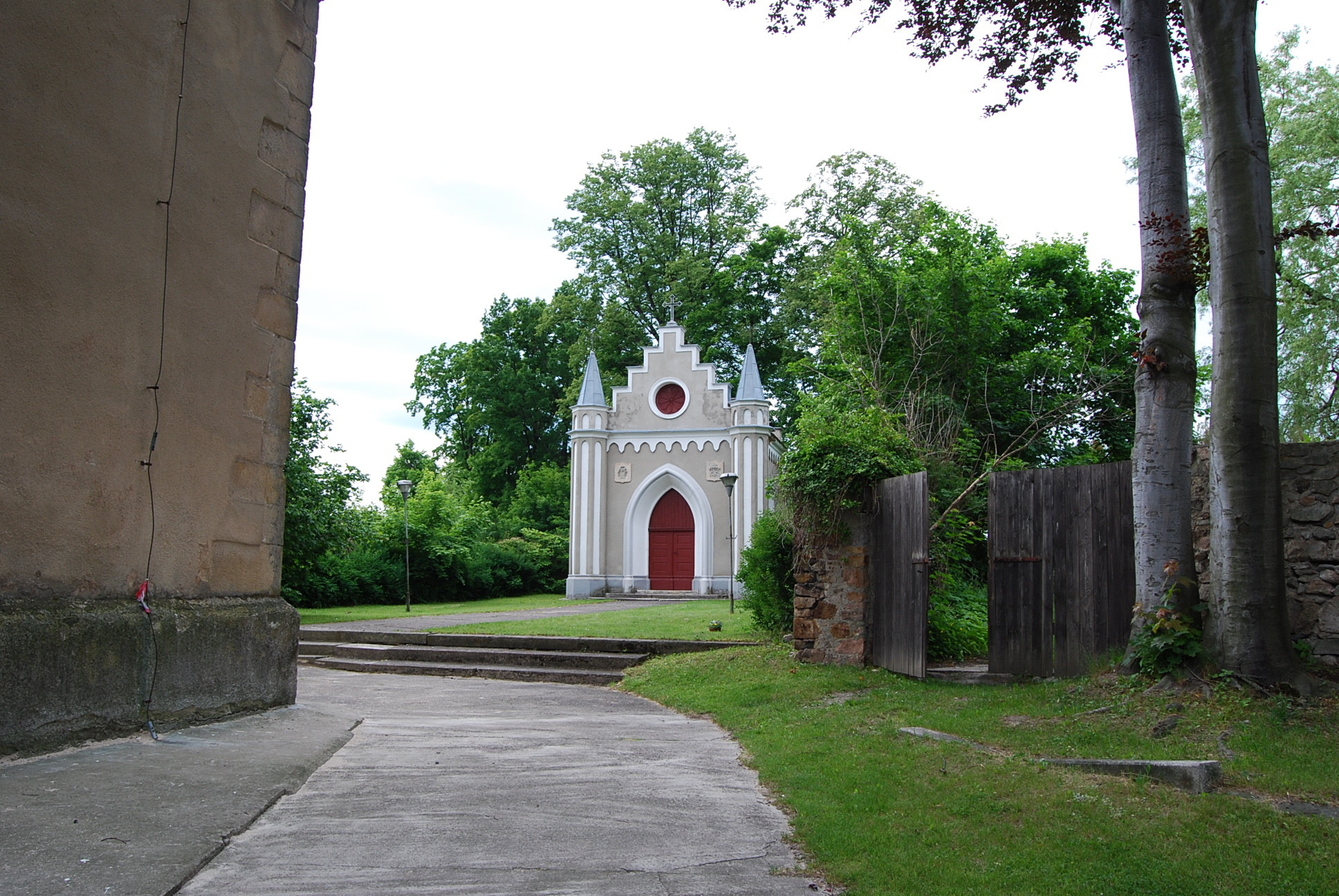 Cmentarz przy kościele Niepokalanego Poczęcia NMP w Łomnicy, pow. jeleniogórski